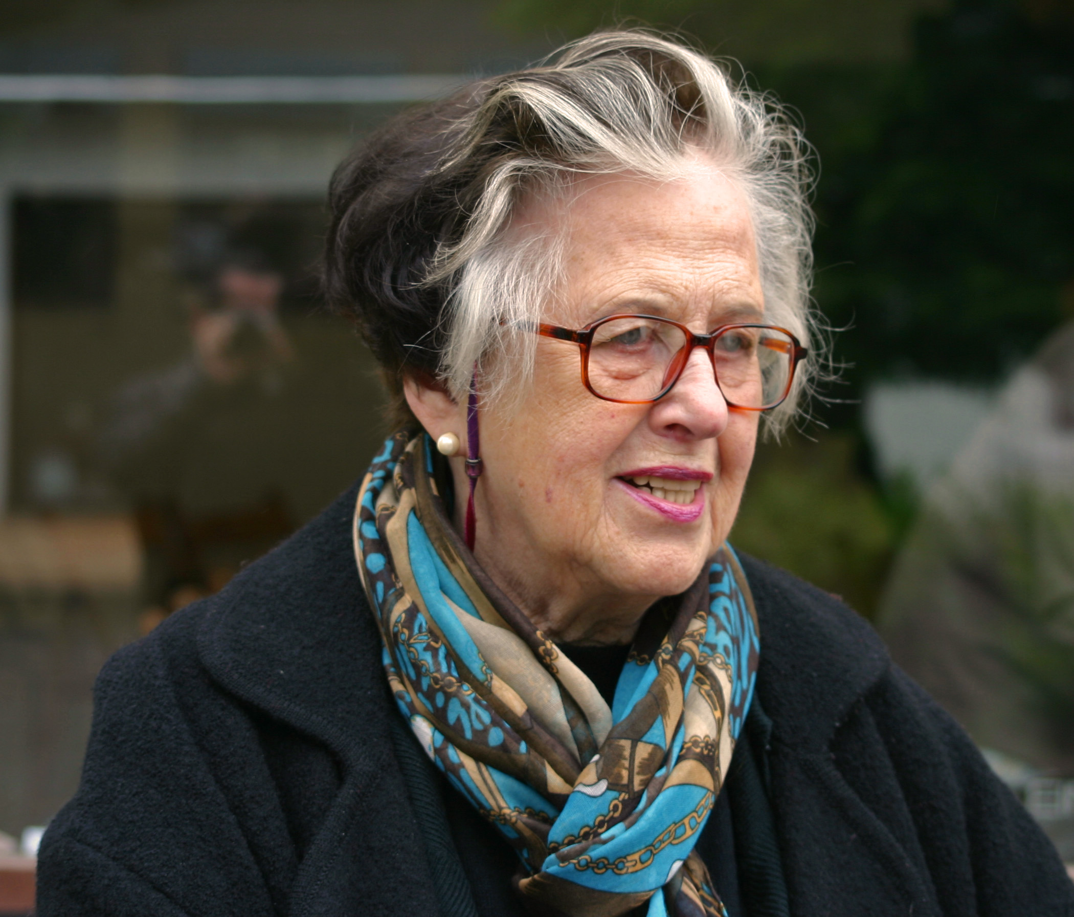 Die Fotografin Vera Tenschert fotografierte von 1954 bis 1991 am Berliner Ensemble zahlreiche Theaterszenen und Künstlerporträts, so Helene Weigel und Ekkehard Schall.